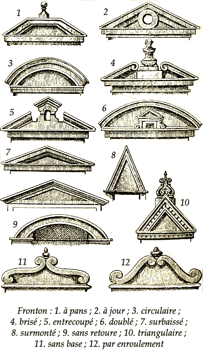 différents types de frontons Source scannée depuis le Larousse 1922 par Nataraja-Shiva